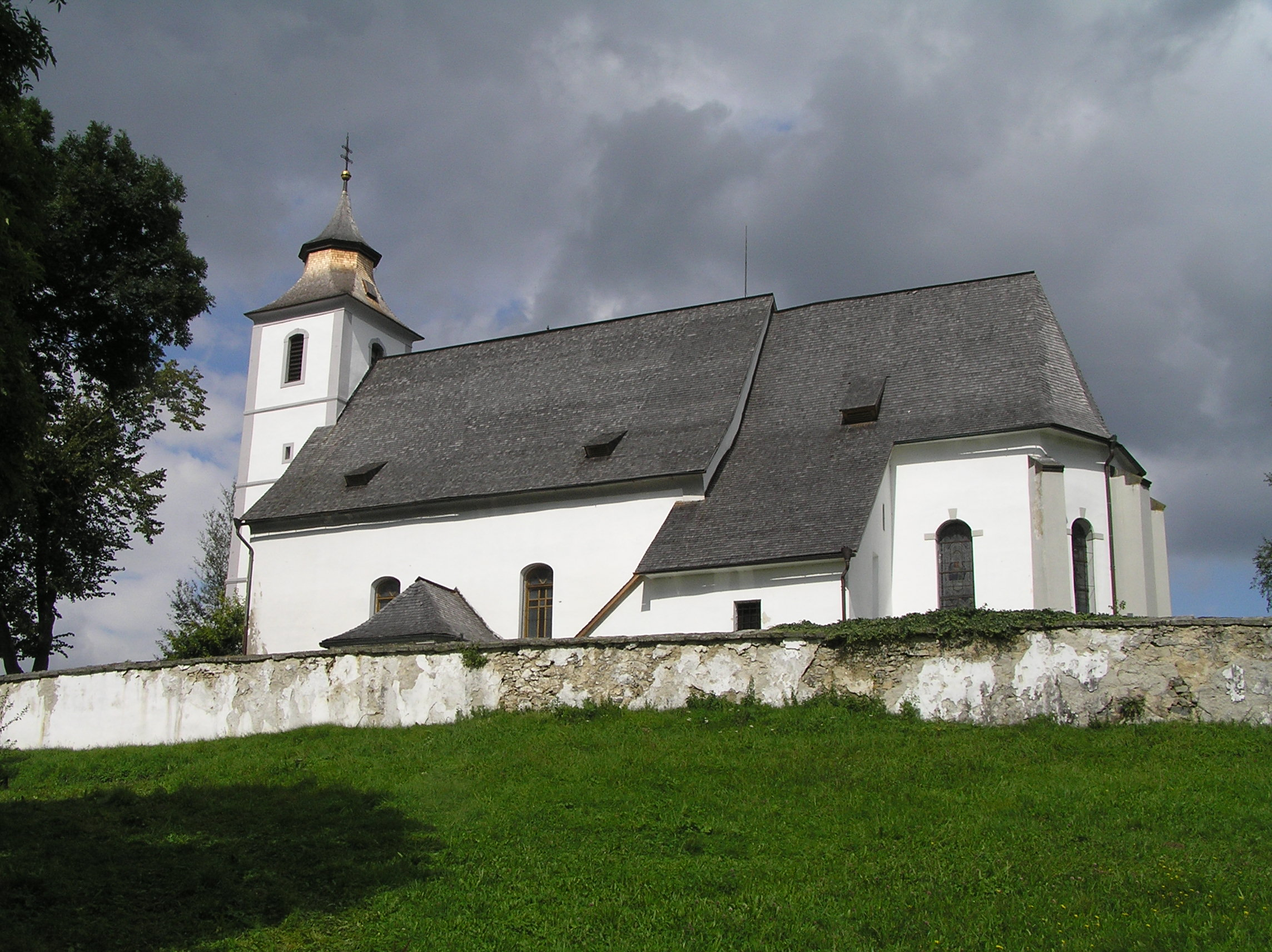 Kostel ve Zbytinách